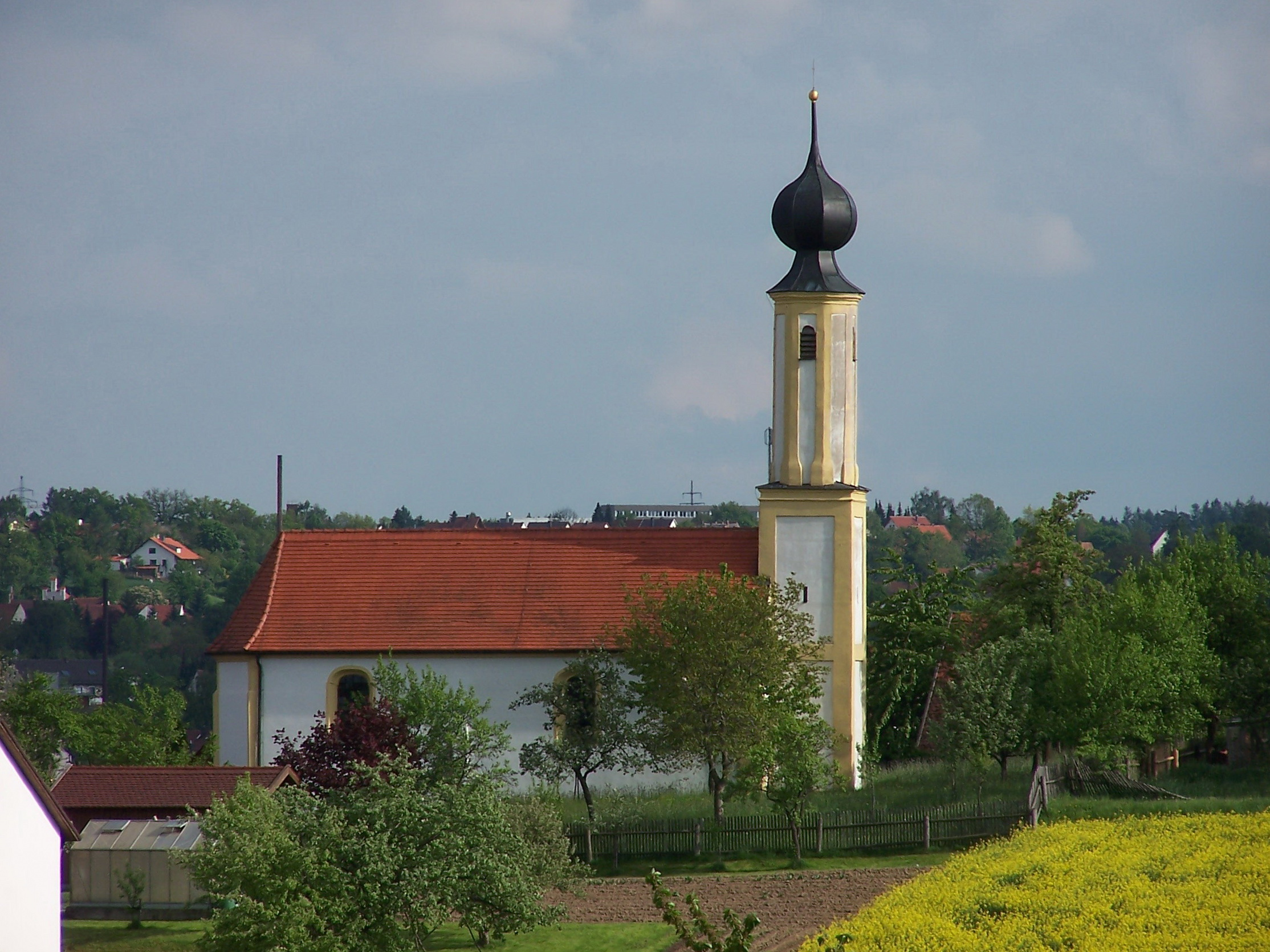 Rottenburg an der Laaber. Pattendorf Bergstraße 22. Filialkirche St. Walburga. Langhaus, 2. Hälfte 13. Jahrhundert, Chor Ende 15. Jahrhundert, barocker Ausbau Mitte 18. Jahrhundert, durch Johann Georg Hirschstötter; mit Ausstattung.